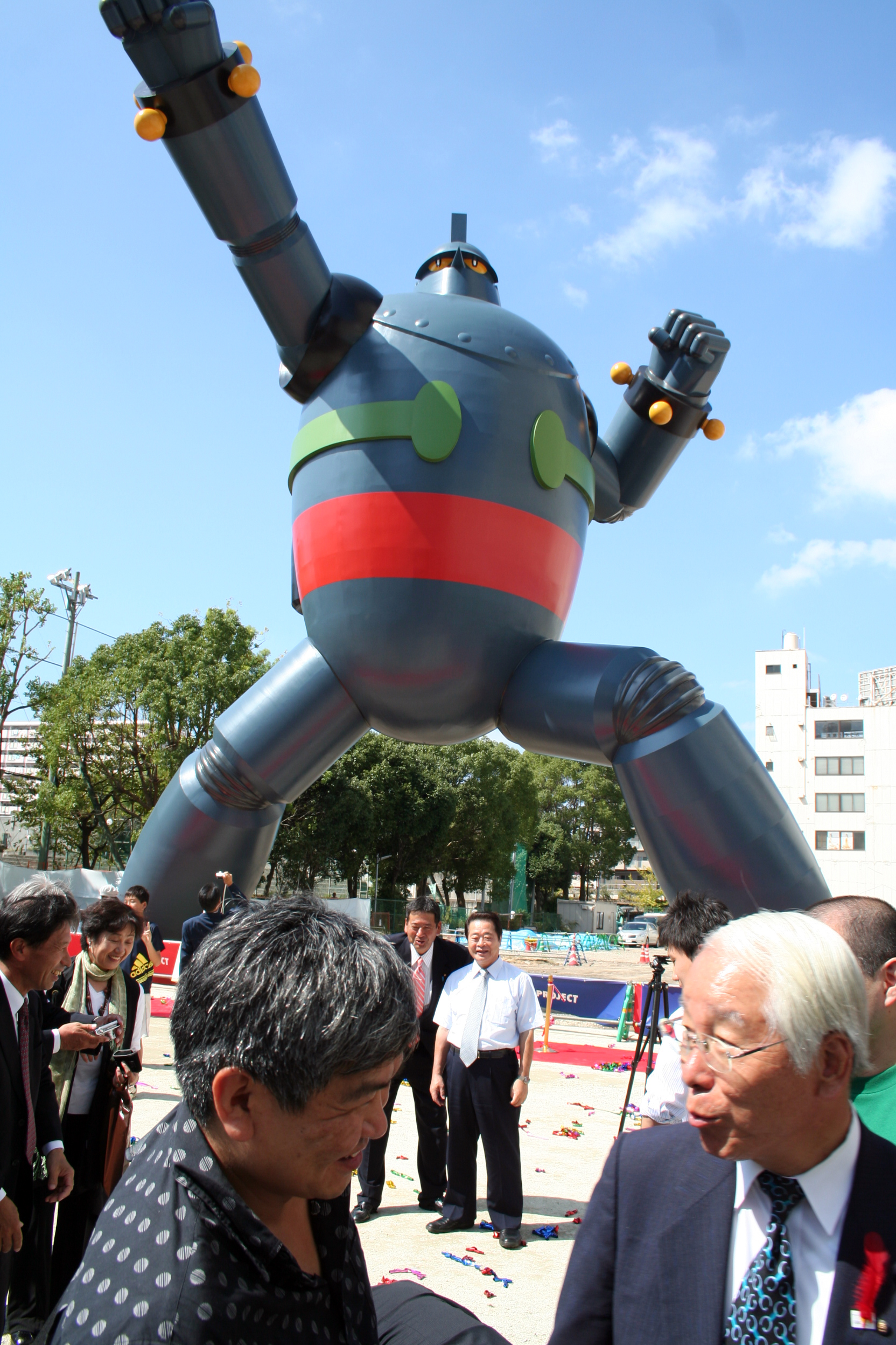 井戸敏三。兵庫県出身の政治家。2009年10月4日、兵庫県神戸市長田区若松公園にて開催された鉄人28号像完成記念式典にて兵庫県知事として出席している時に撮影。 井戸敏三と完成した鉄人28号像。奥に映っているスーツを着た人物は向山好一衆議院議員。